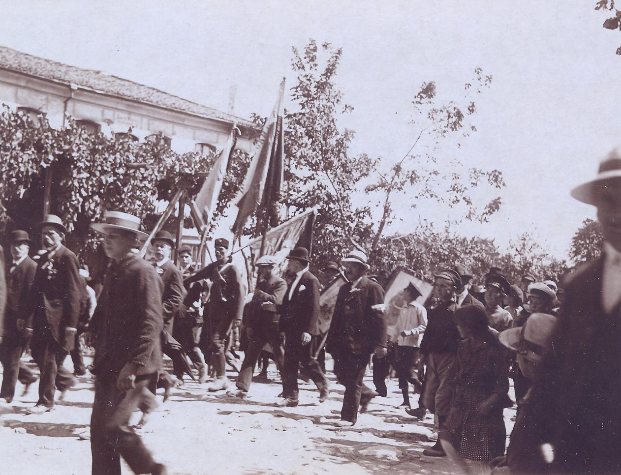 Опълченците от 1885 г. в Стара Загора със Самарското знаме.